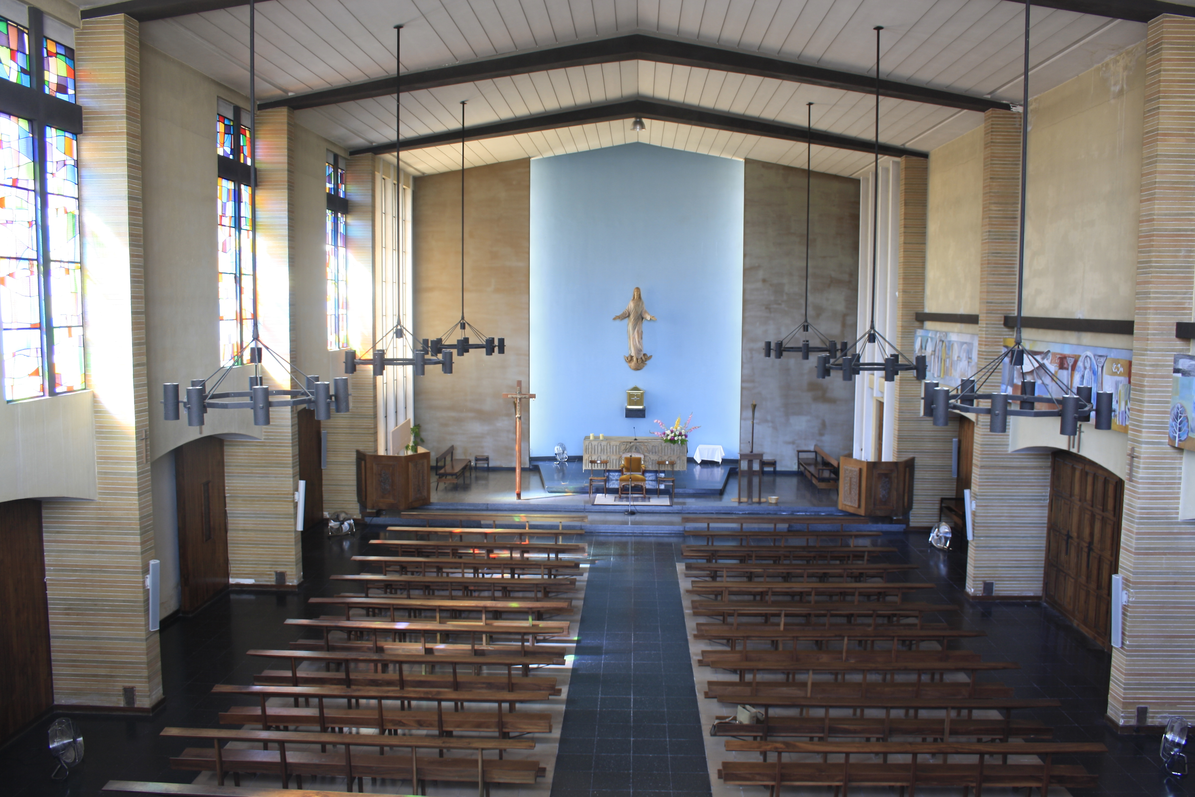 Imatge de la nau central de l'església de Santa Maria de Bassacs. La imatge de Santa Maria que hi ha al fons al centre i l'altar és una obra de l'escultor Lluís Maria Saumells i Panadès.